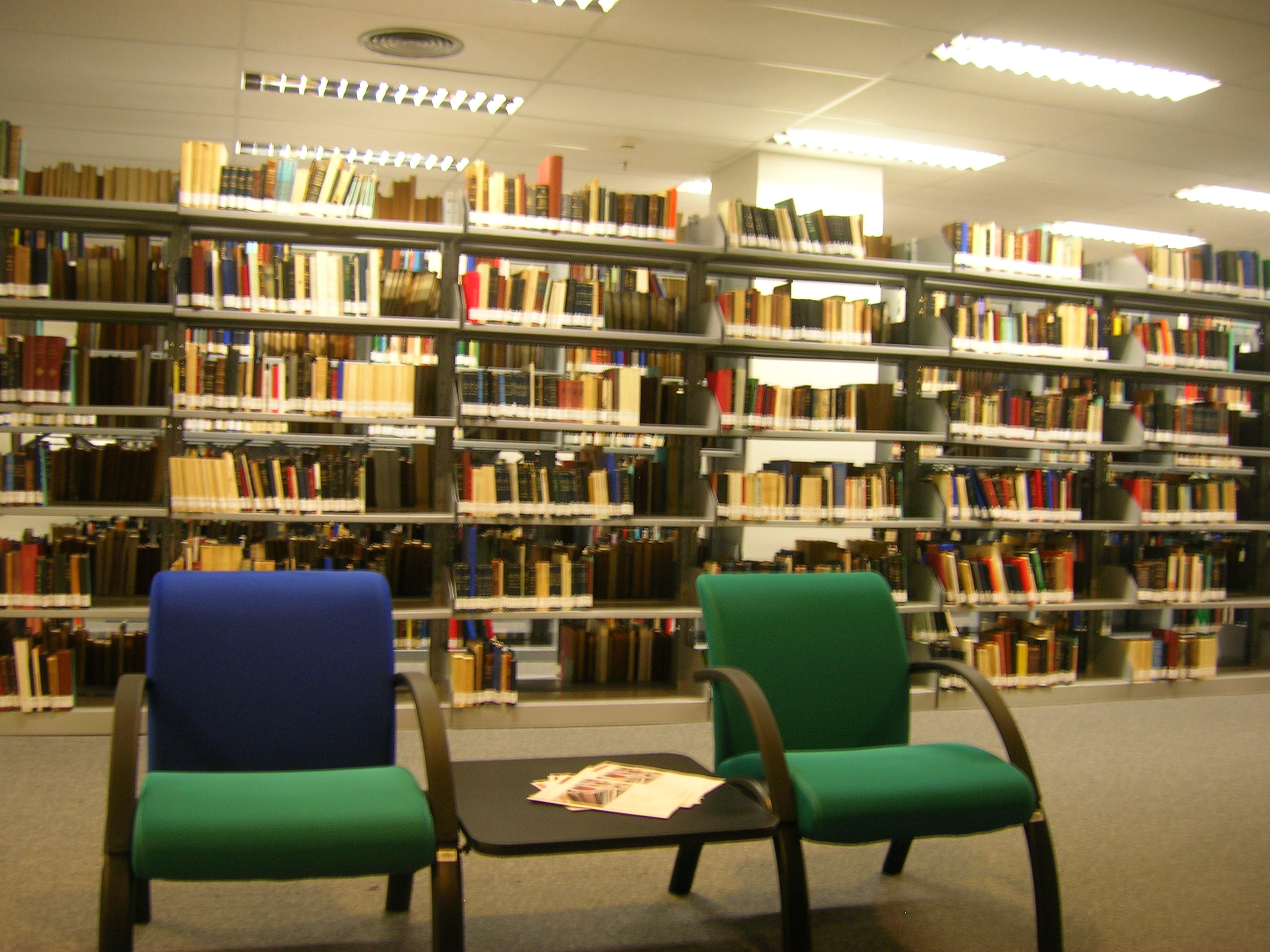 Um dos espaços de leitura da Biblioteca Central Ir. José Otão, da PUCRS.